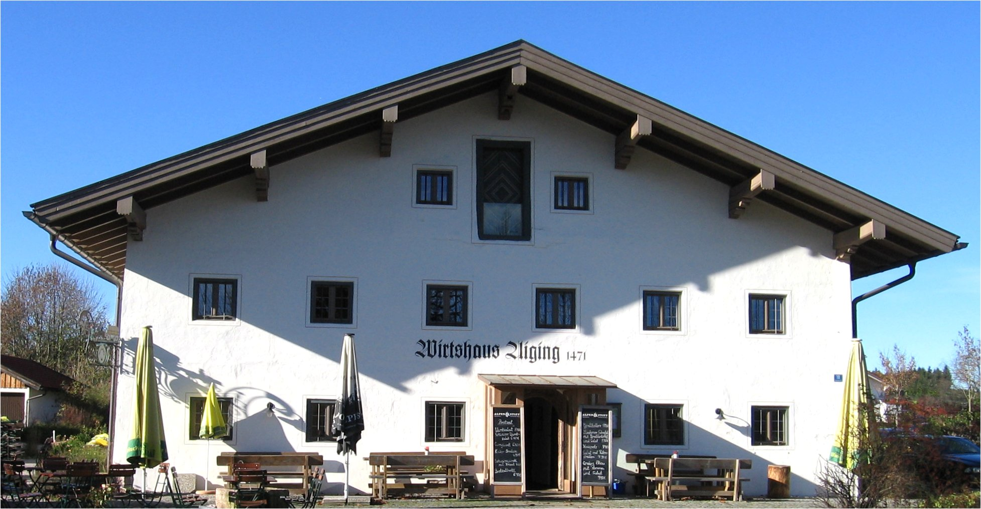 Historisches Wirtshaus Aiging 1471, Tafernwirtschaft, stattlicher Einfirstbau mit Flachsatteldach